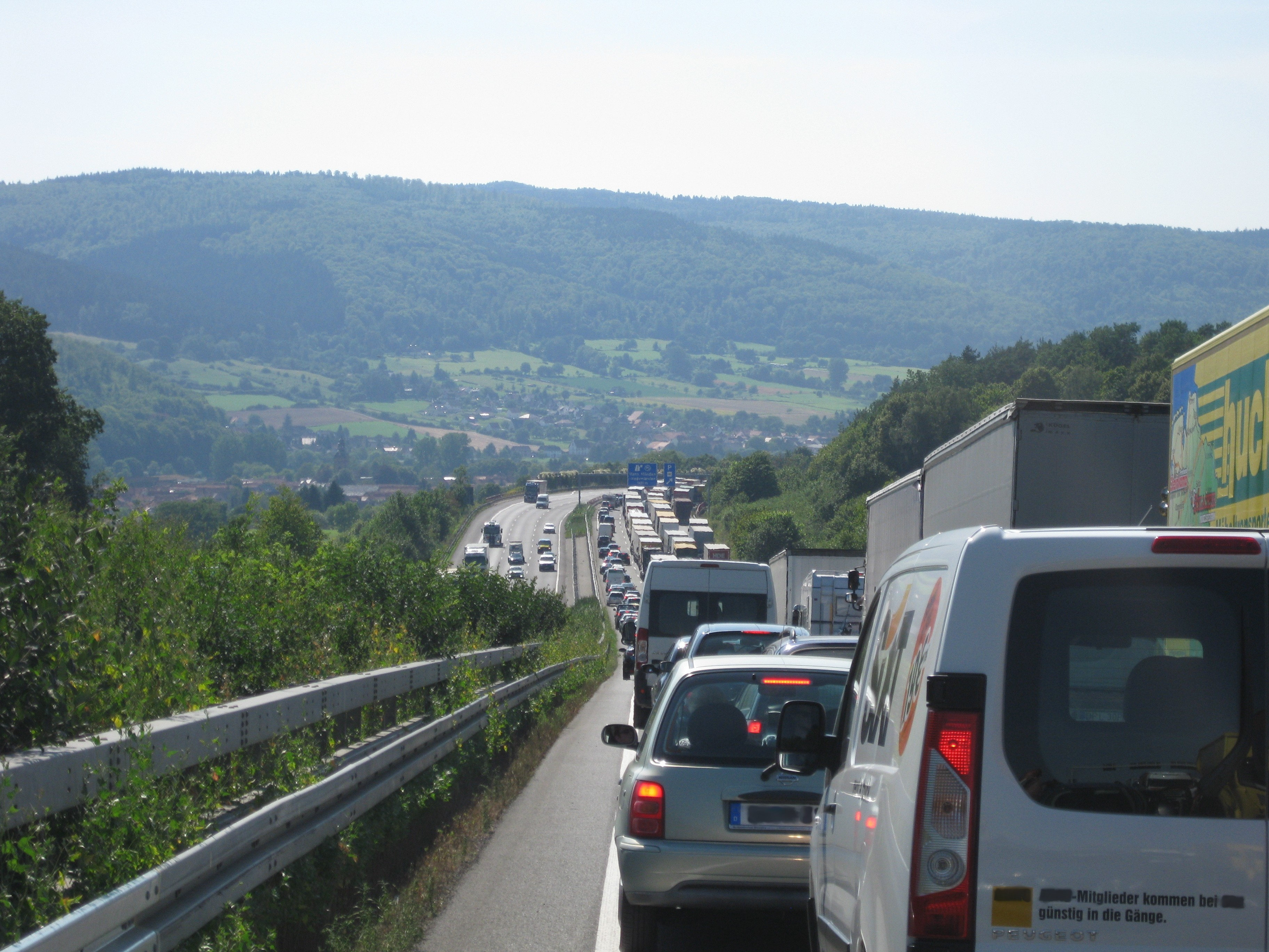 Die A 7 bei Hann-Münden oberhalb von Hedemünden (im Hintergrund der Kaufunger Wald)